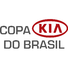 Logo da Copa Kia do Brasil